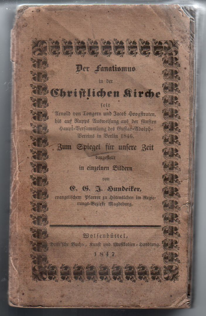 page from book: Elias Gerhard Julius Hundeiker: Der Fanatismus in der christlichen Kirche, Wolfenbüttel 1847